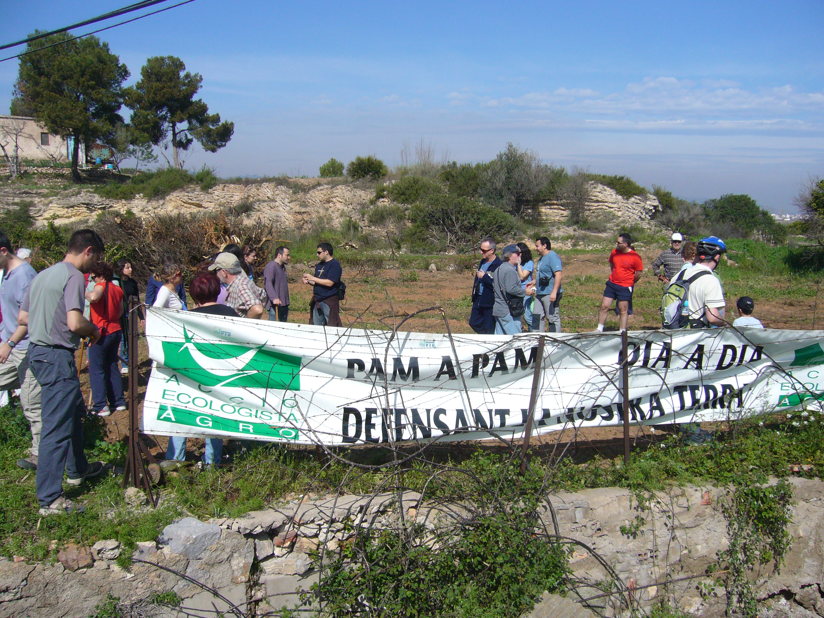 Voluntariat ambiental d'Acció Ecologista Agró a la Marjal d'Almenara 2008